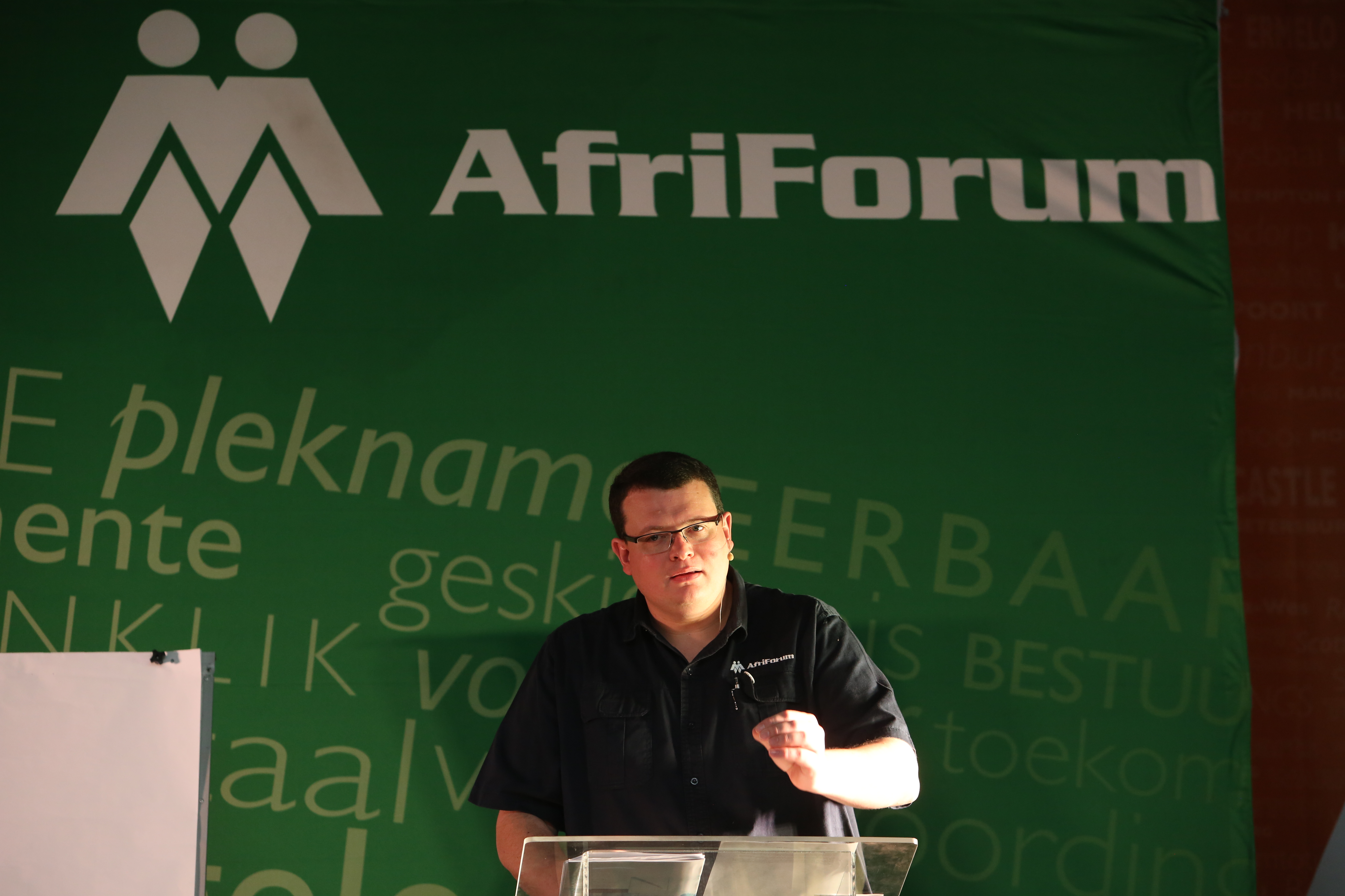 Cornelius Jansen van Rensburg besig om AfriForum se takke toe te spreek tydens die 2015 Nasionale Takkongres te Klein Kariba.